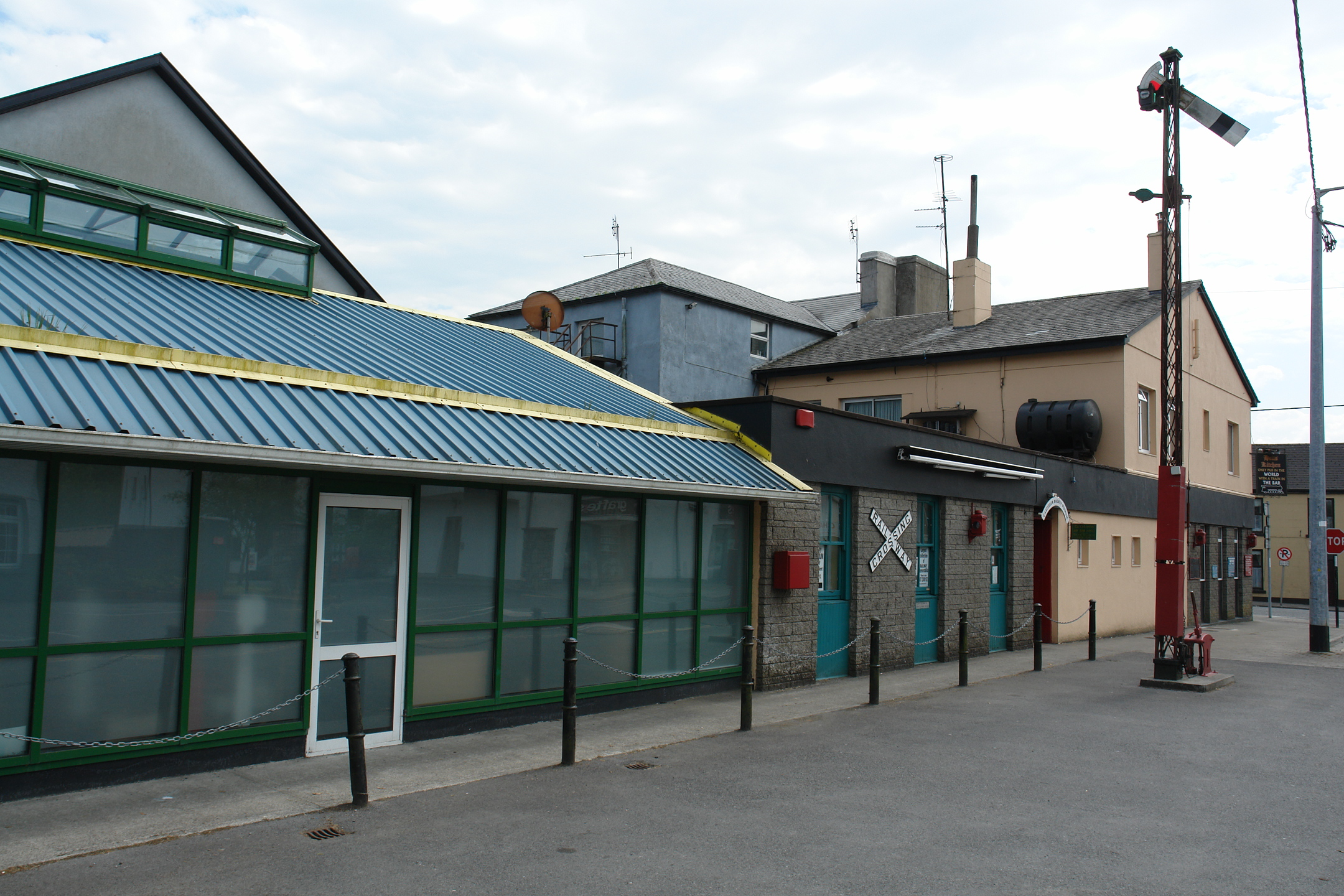 Hells Kitchen Bar and Railway Museum in Castlerea, County Roscommon, Ireland